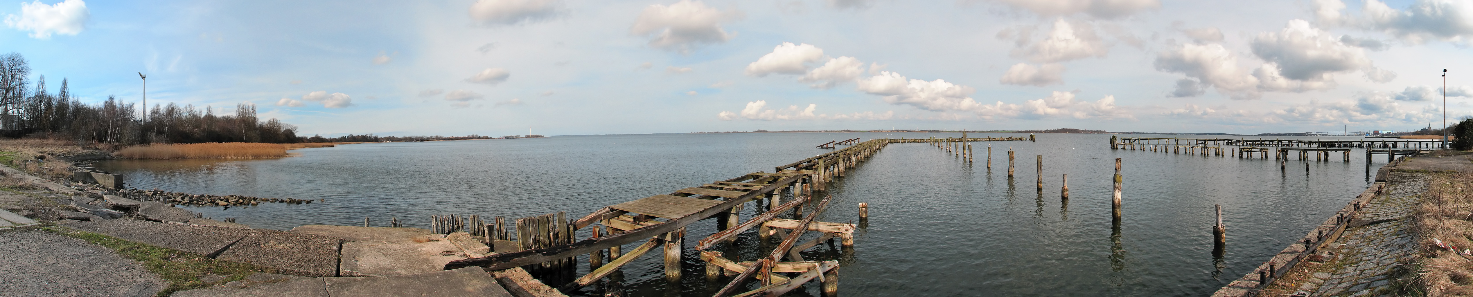 Dieses Bild zeigt einen Panoramarundblick vom Stralsund Sund. Aufnahmeort ist der alte Hafen an der Schwedenschanze.